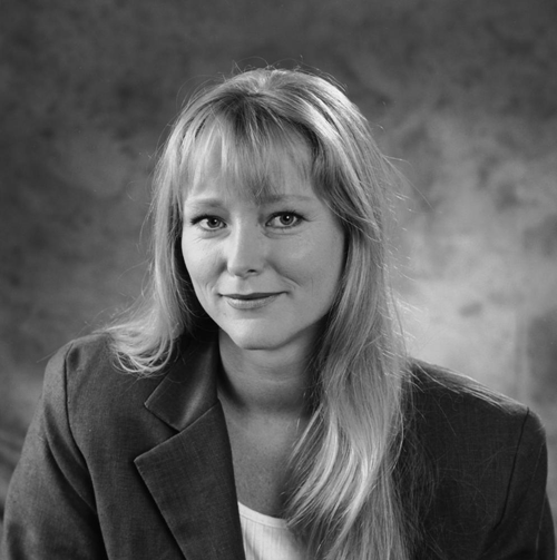 Antoinette Hertsenberg.